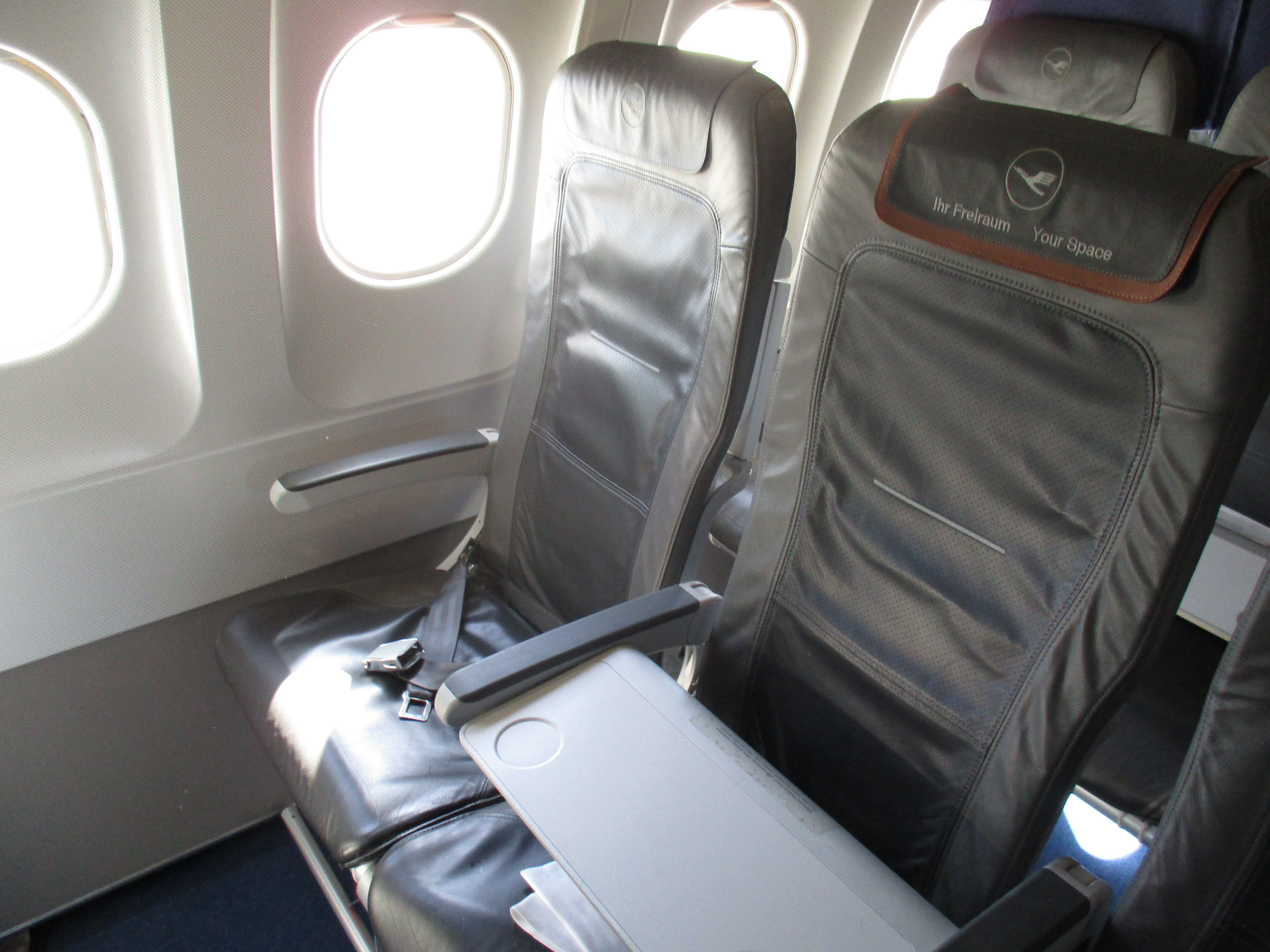 Ein Sitz der Business Class in einem A321 der Lufthansa.